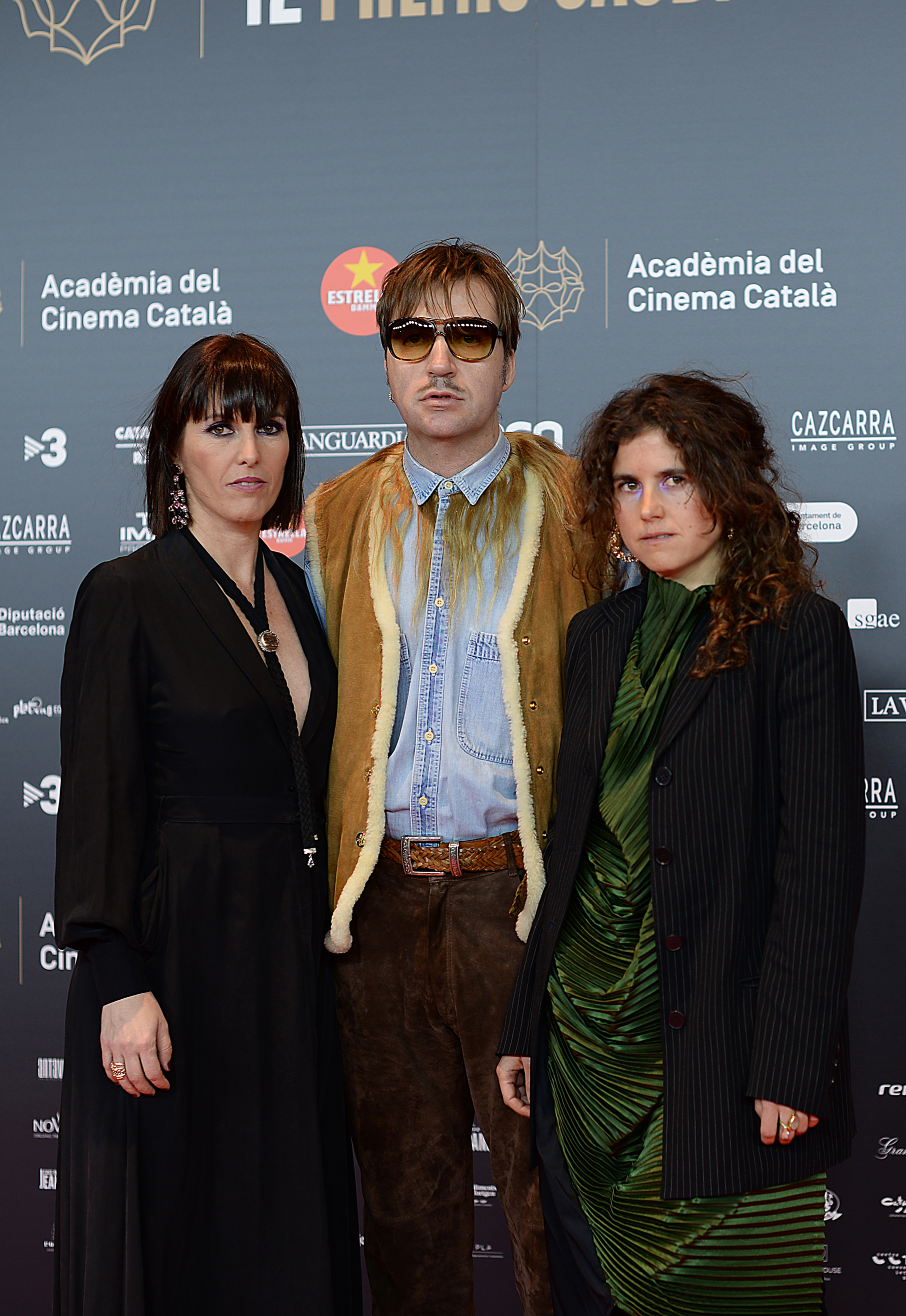 Montse Triola, productora executiva; Albert Serra, director, i Rosa Tharrats, vestuari (Liberté), XII Premis Gaudí (2020)